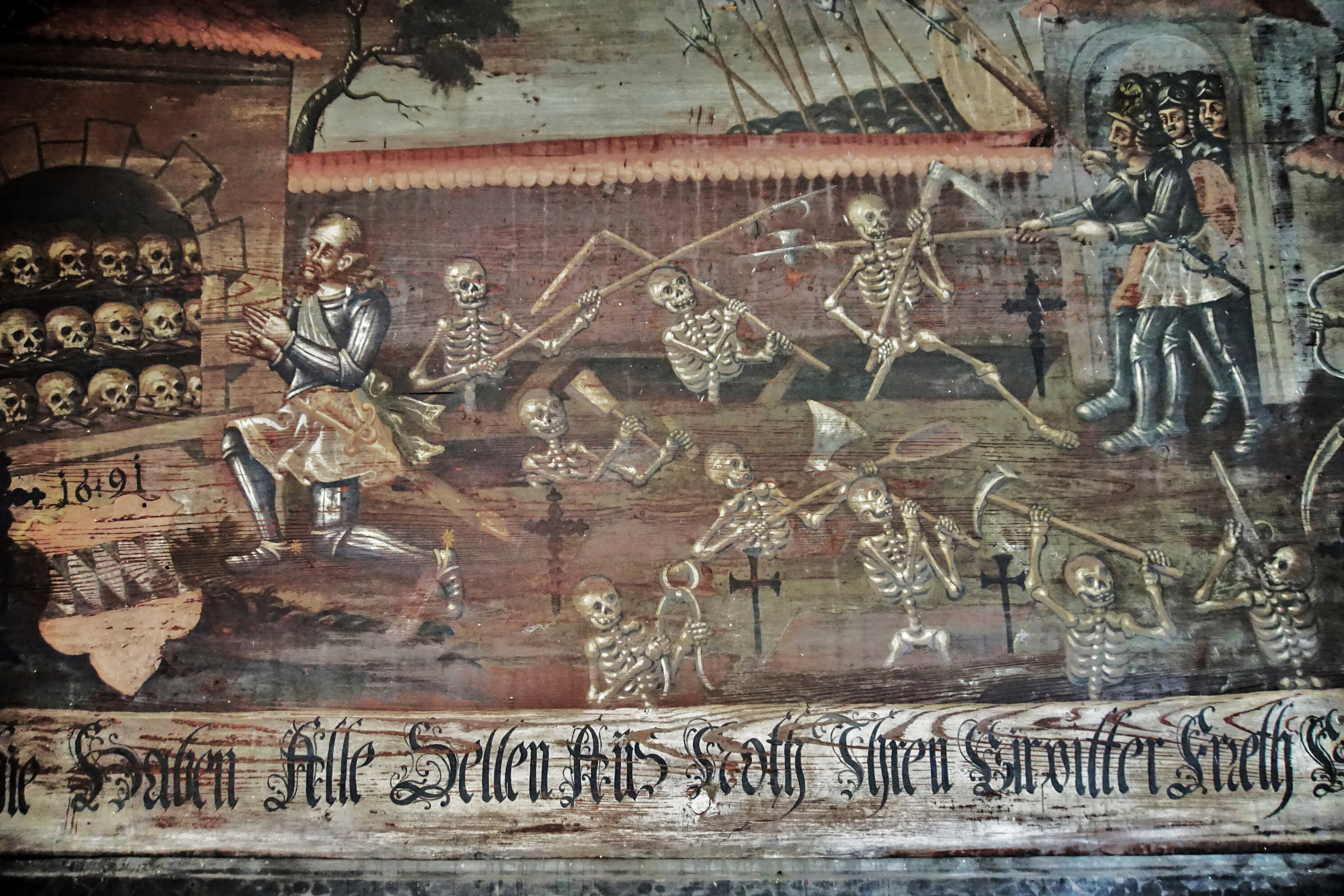 Wandgemälde von 1691 in der Friedhofskapelle neben der Kirche St. Johann Baptist und Heilig Kreuz in Westerndorf, Rosenheim. Dankbare Tote schützen einen für sie betenden Ritter vor Angreifern. Bildunterschrift: „Allhie Haben Alle Sellen Aus Noth Ihren Virpitter Ereth Vom Todt.” (Übertragung etwa: Allhier haben alle Seelen in der Not ihrem Fürbitter vor dem Tod errettet